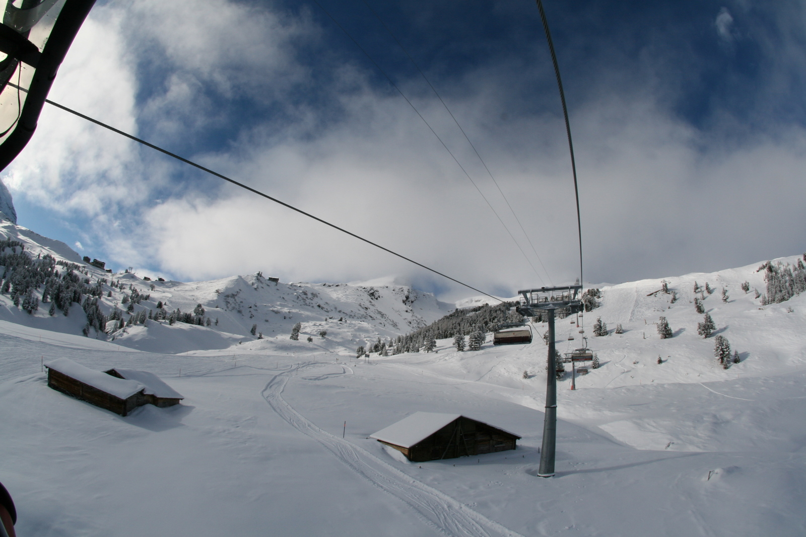 Grindelwald, Switzerland